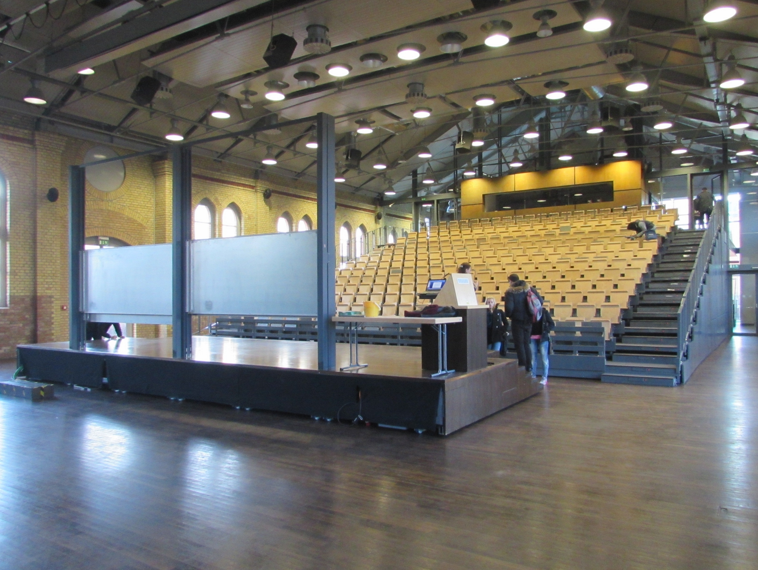 audimax der fh brandenburg von innen